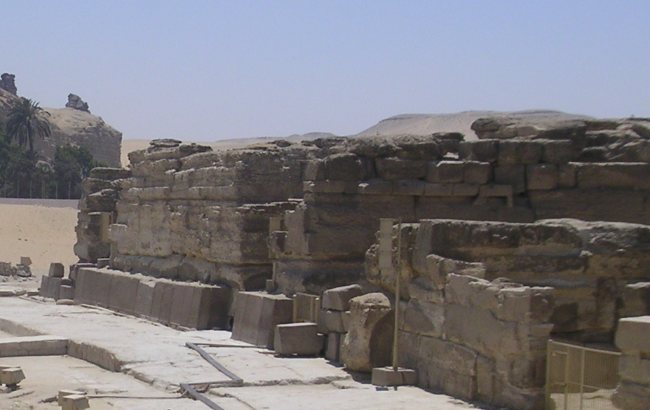 Le temple d'accueil du complexe funéraire de Khéphren à Gizeh avec son revêtement de granit conservé sur les premières assises de sa façade.